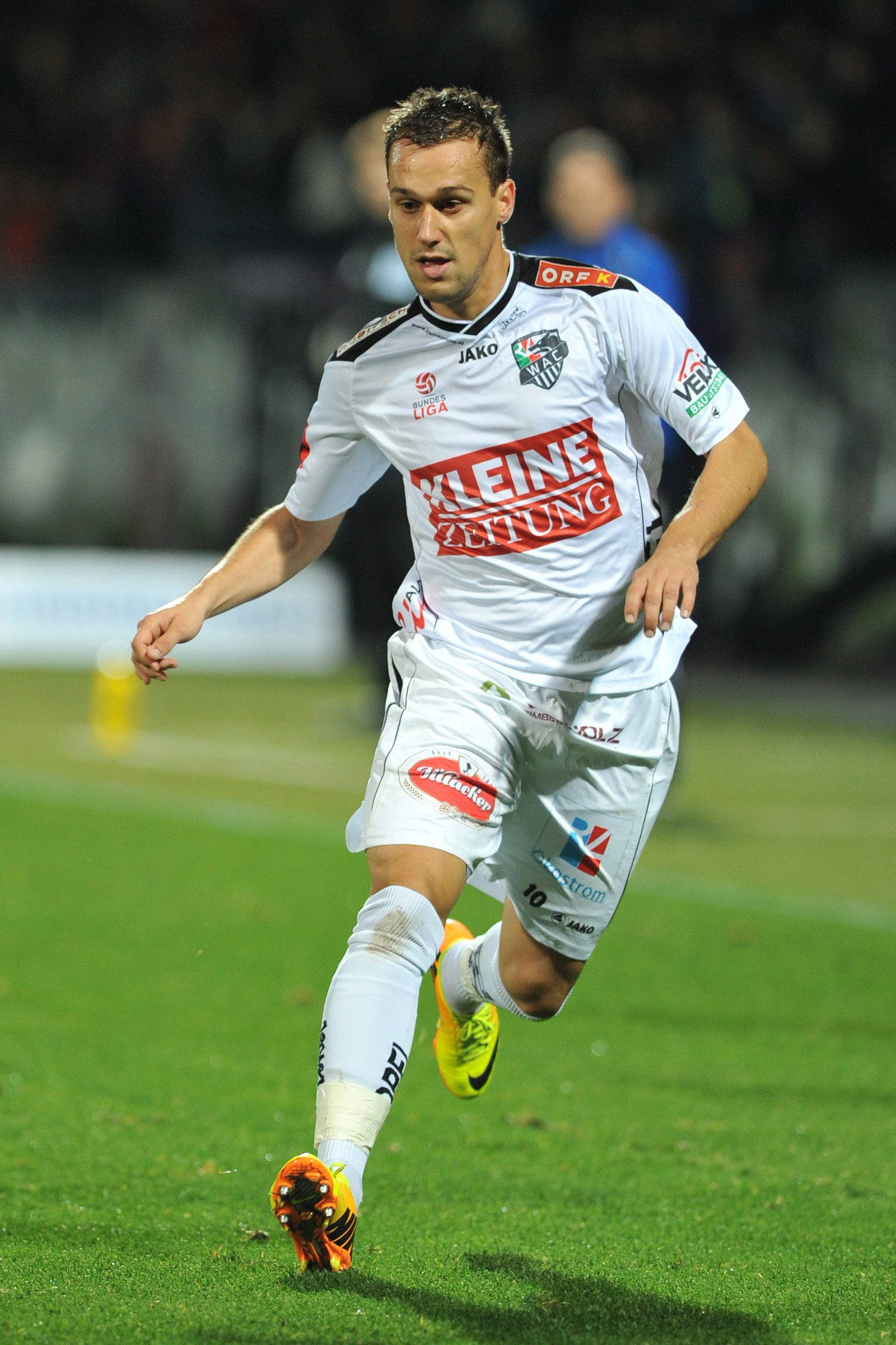 Bundesliga:FK Austria Wien - RZ Pellets WAC Michael Liendl